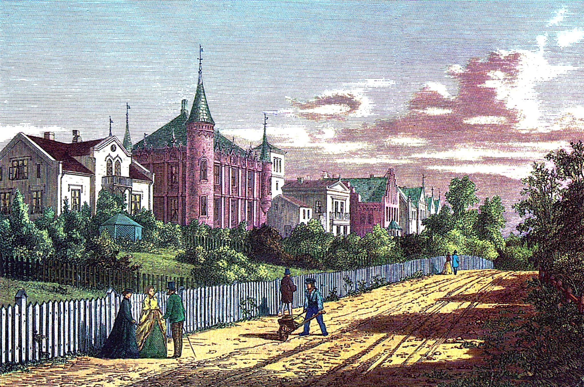 Homannsbyen, bygningene er tegnet av Georg Andreas Bull